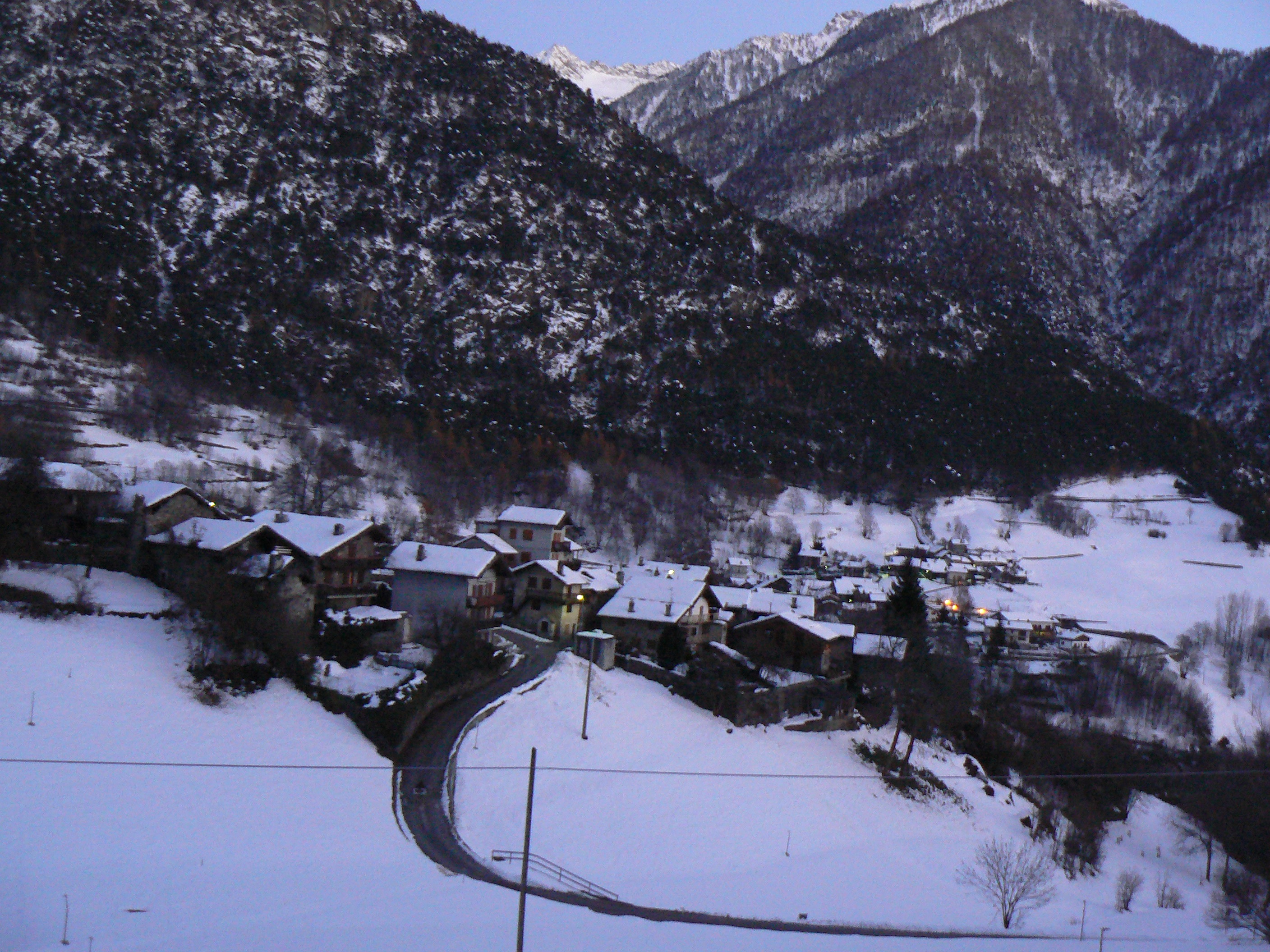 Frazione Maé, Challand-Saint-Anselme, Valle d'Aosta, Italia.